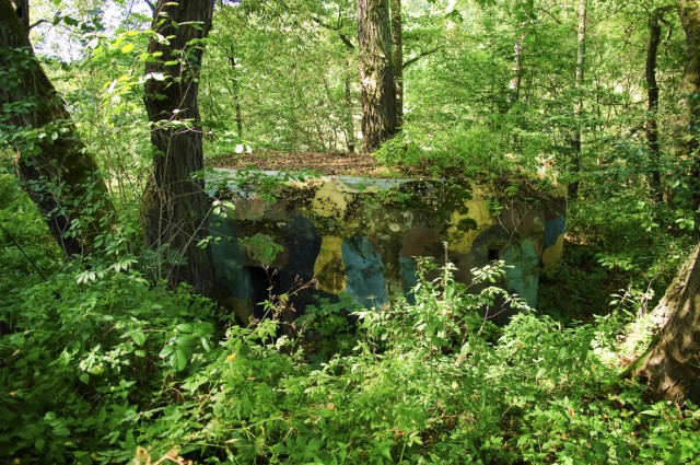 Objekt u Rozprechtického rybníka - dnešní stav